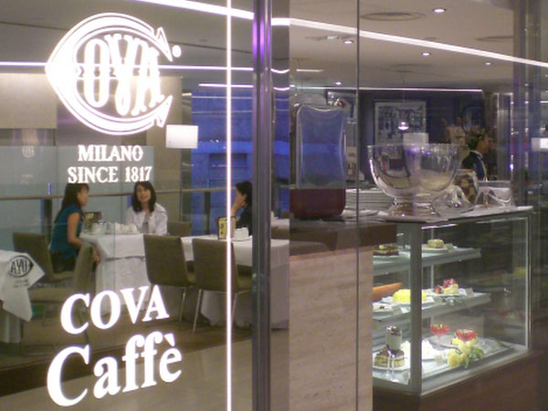 COVA Caffe